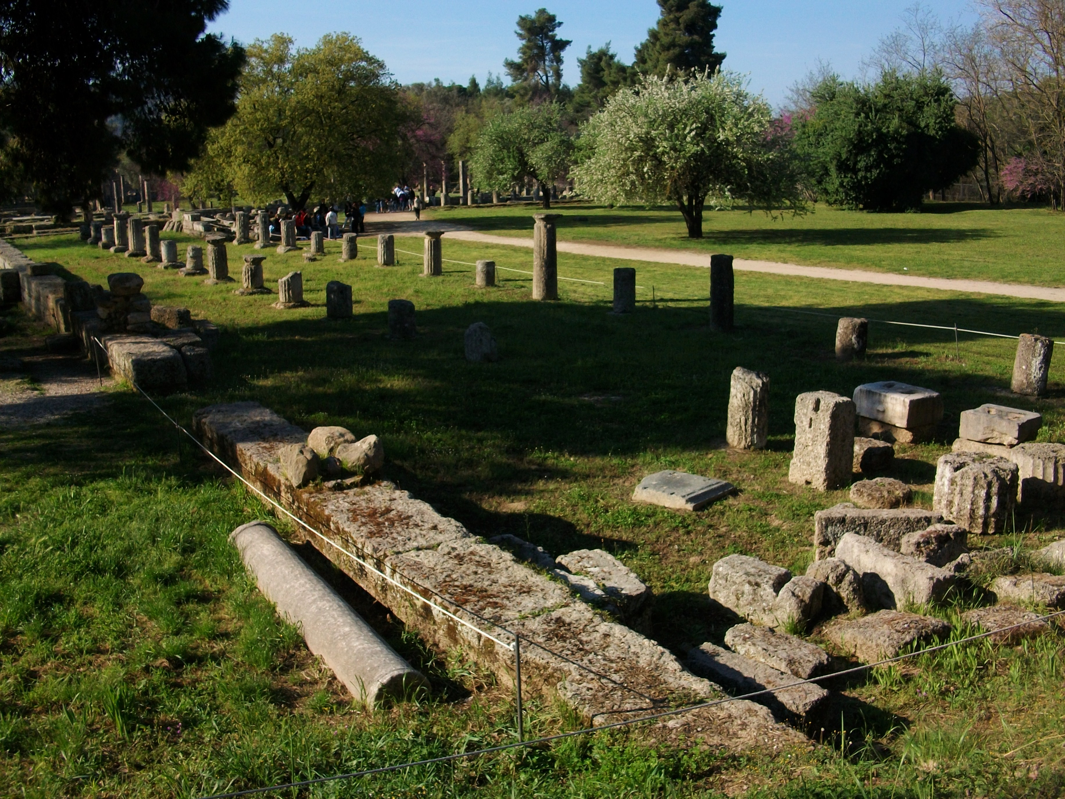 Stoà oriental del gimnàs d'Olímpia.